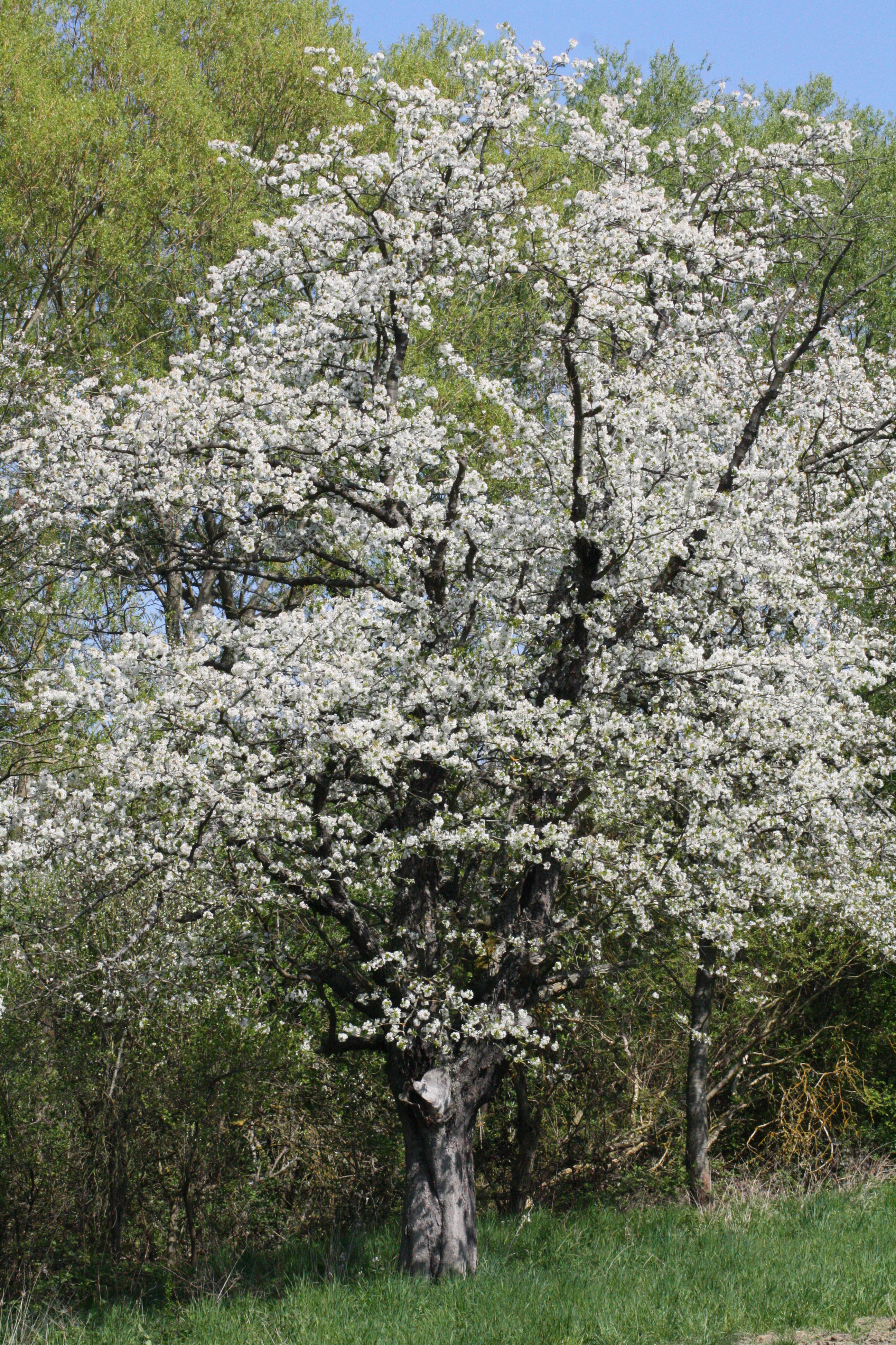 Kesterter Schwarze - alte Süßkirschsorte - Blüte Ende April 2015